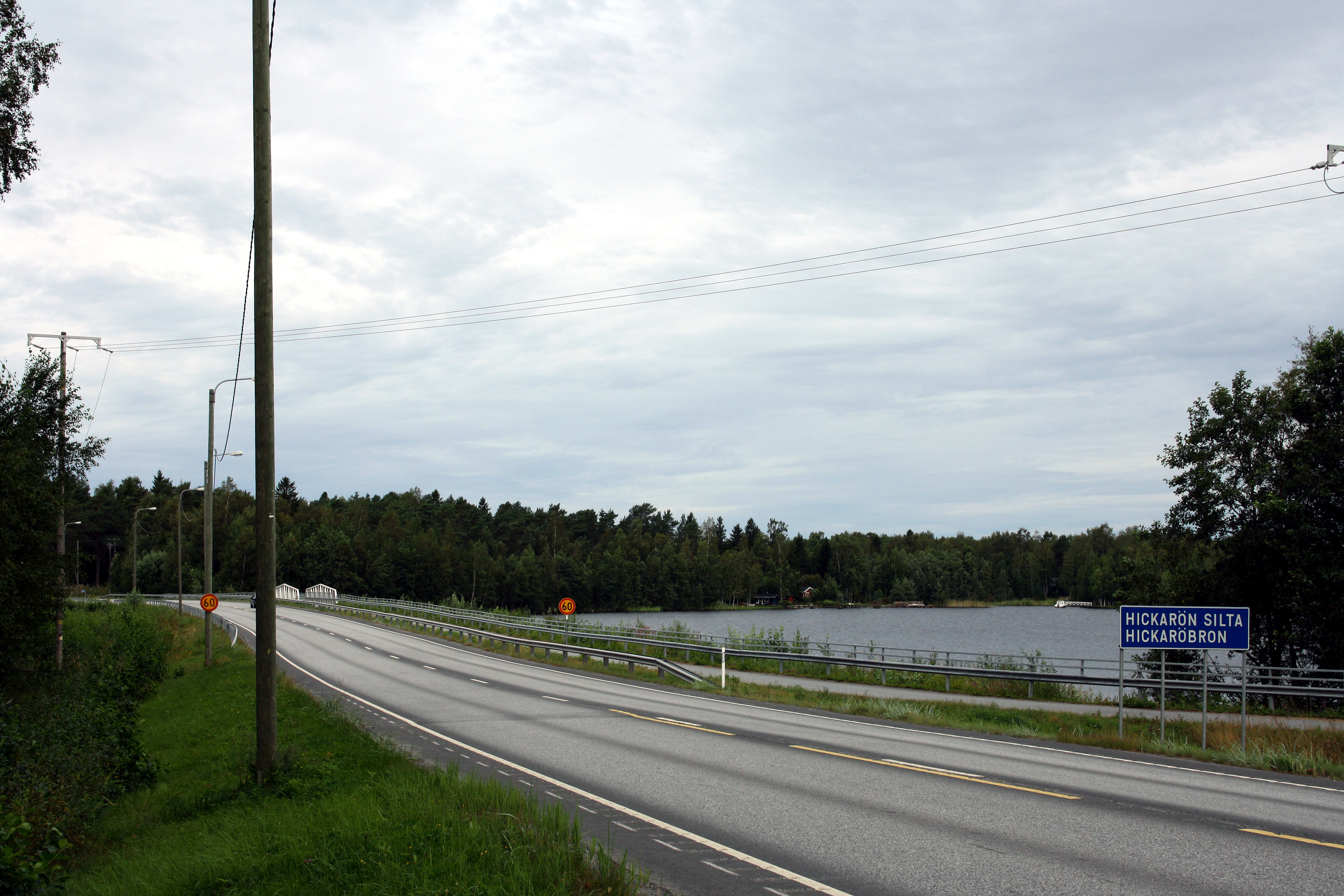 Hickarön silta Kokkolassa.